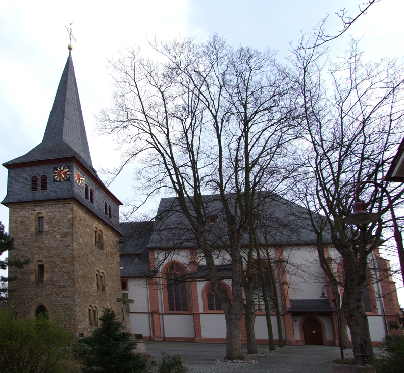 Simultankirche Bechtolsheim